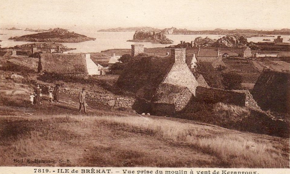 Bréhat : vue prise du moulin à vent de Keranroux (carte postale Émile Hamonic, vers 1920)